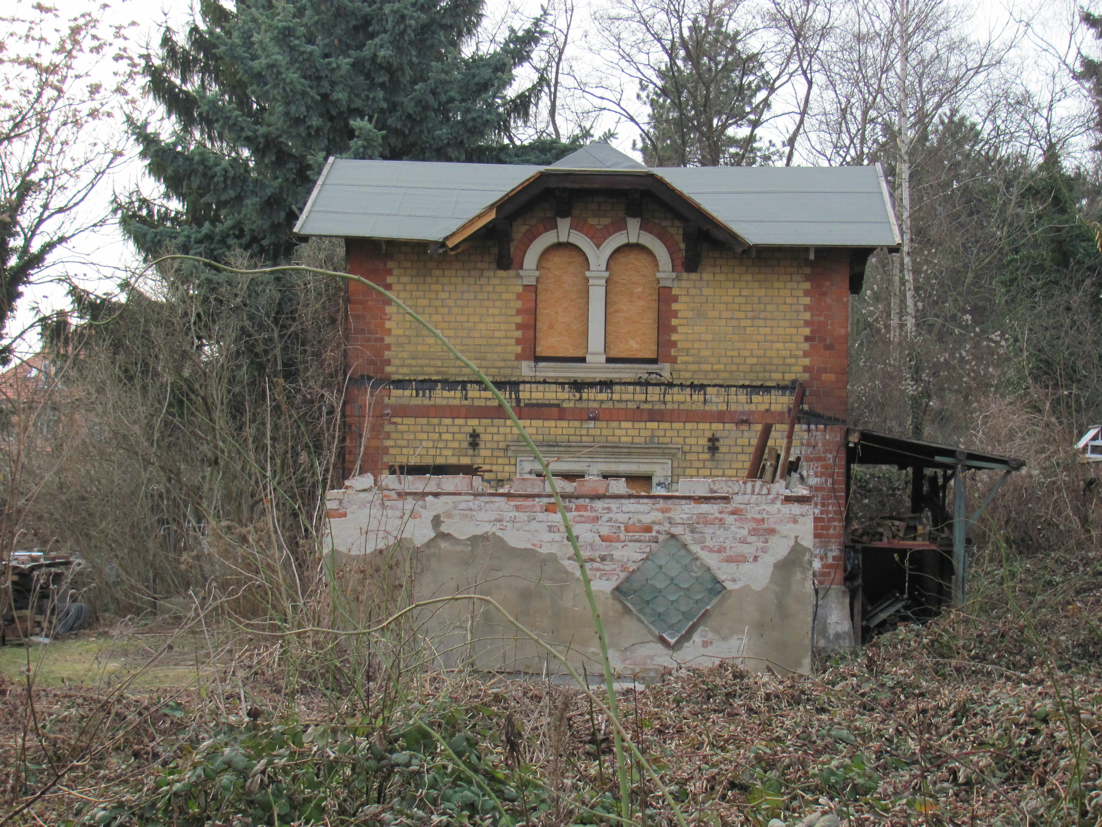 Radebeul Schildenstraße 13, Eiskeller Knötzsch's Weinrestaurant